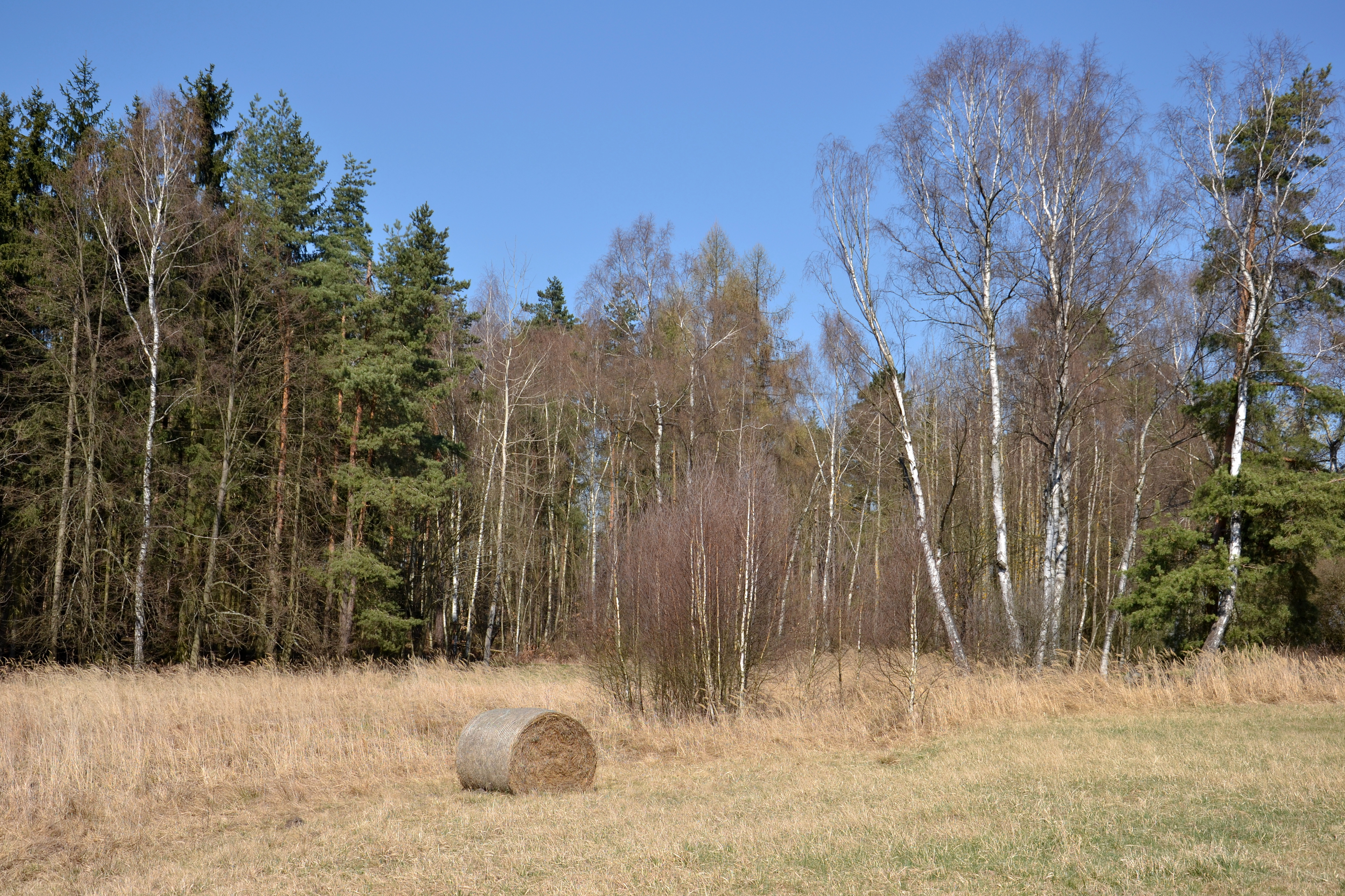 Prameny Javornice – celkový pohled